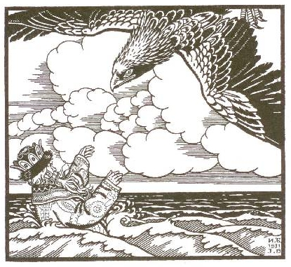 Иллюстрация И. Я. Билибина к русской народной сказке «Морской царь и Василиса Премудрая»